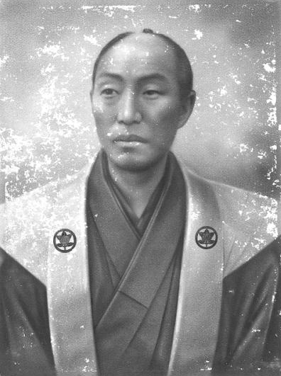 斎藤伝十郎、明治3年2月撮影、29歳